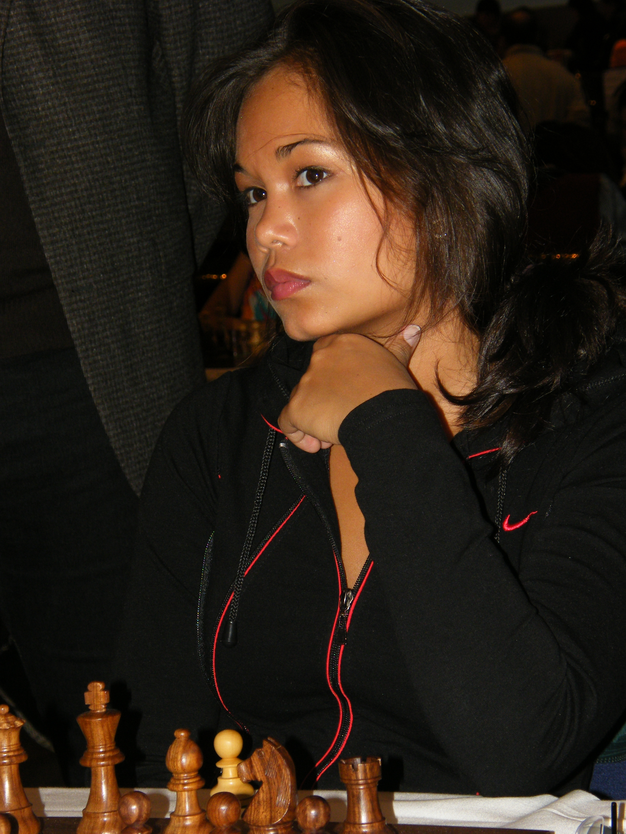 Arianne Caoili bei der 38. Schacholympiade in Dresden 2008